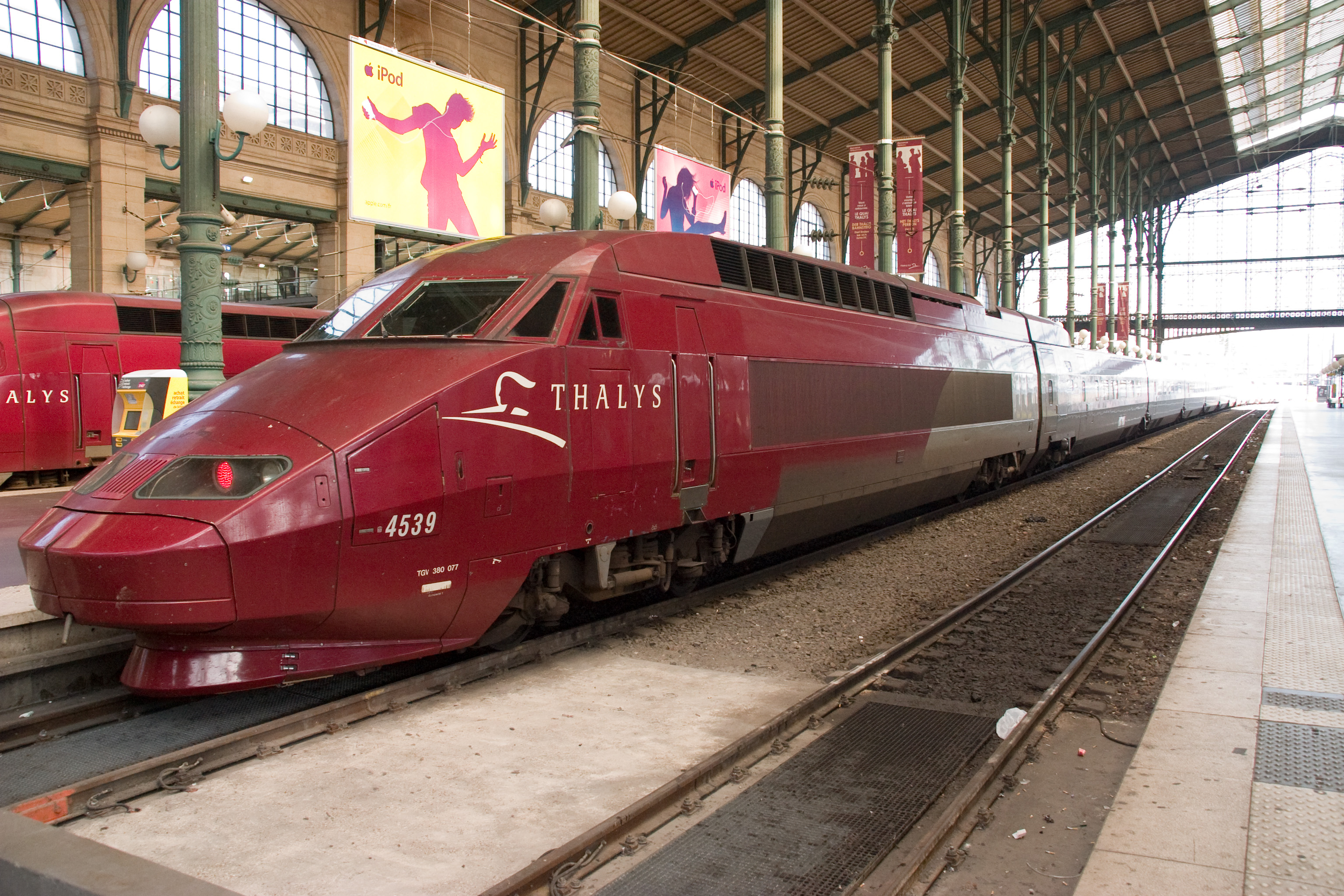 Gare du Nord, Paris, France